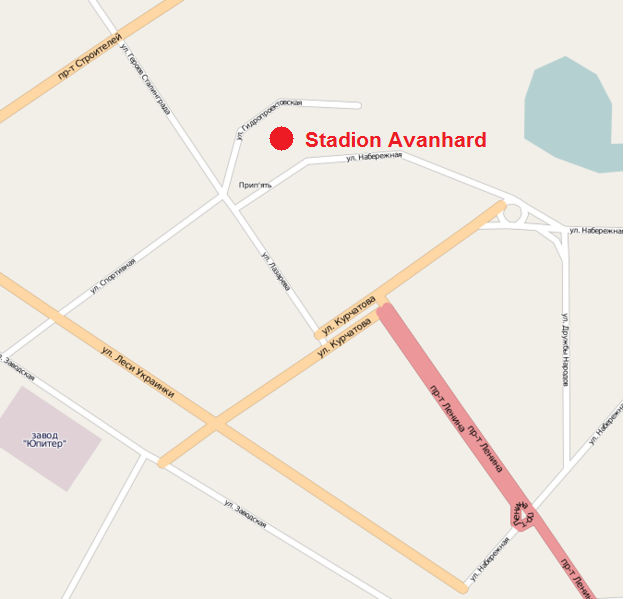 Location of Stadion Avanhard in Prypiat